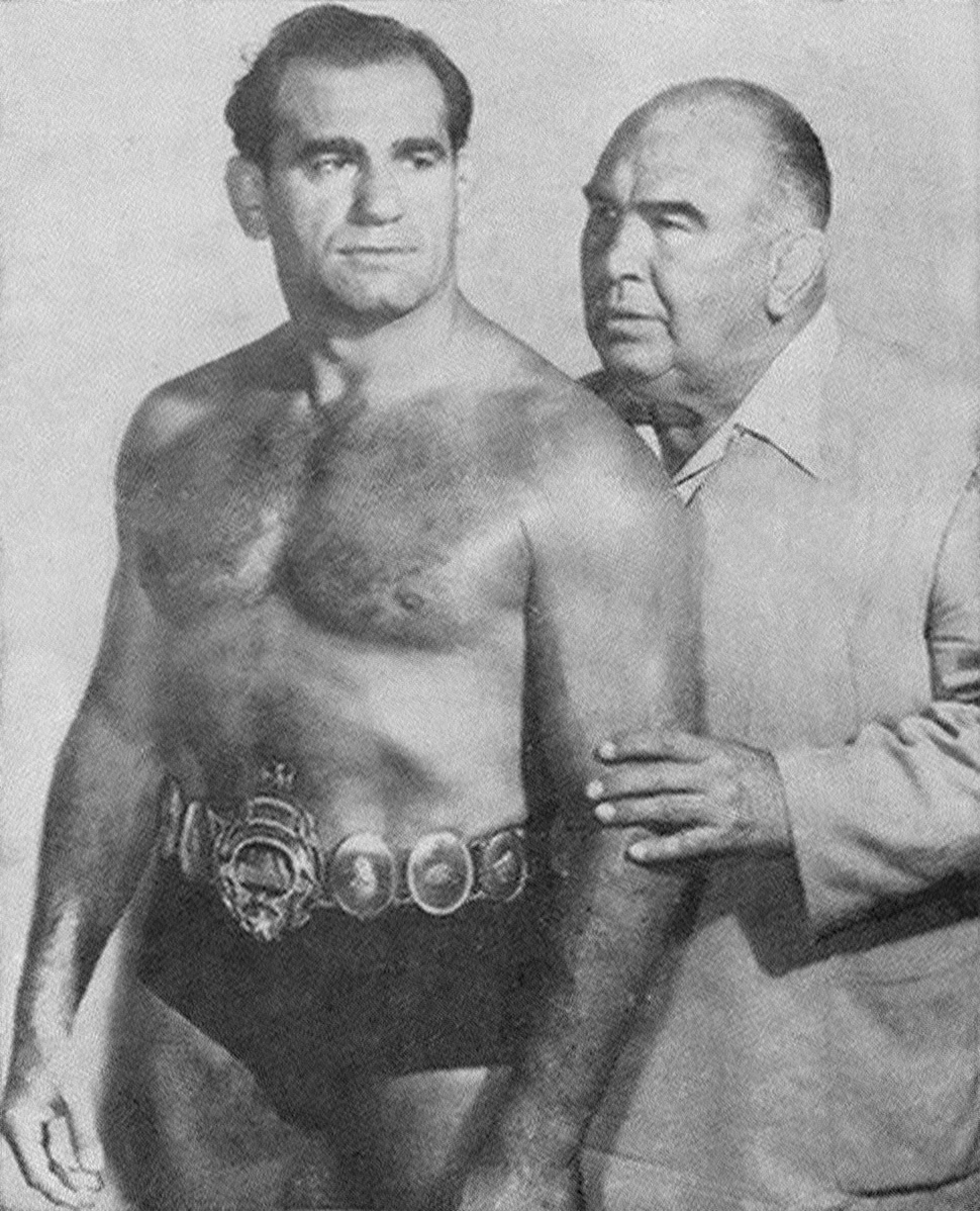 Une du journal Sports Facts du 21 avril 1953 avec Lou Thesz et Ed Lewis.